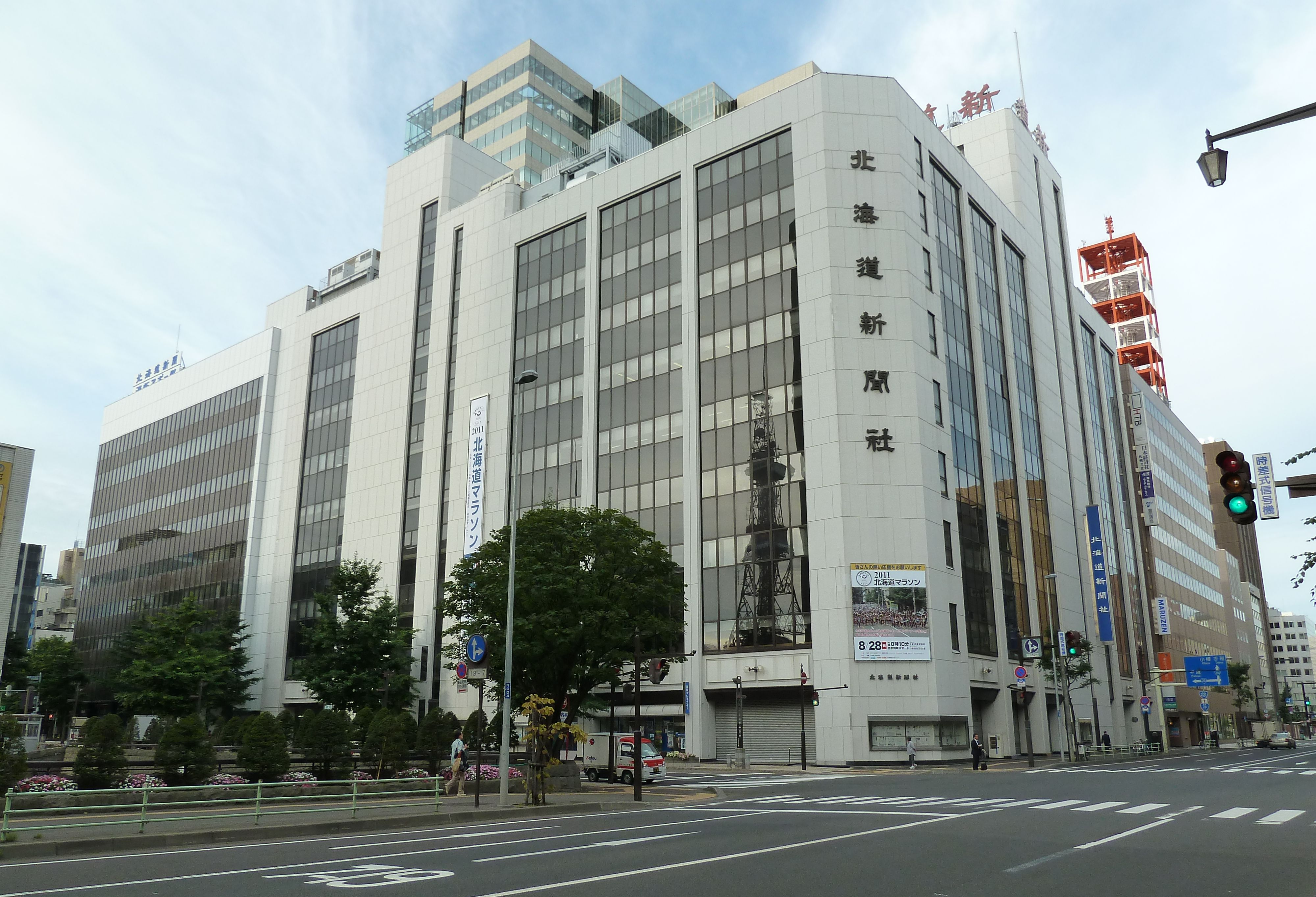 北海道新聞本社